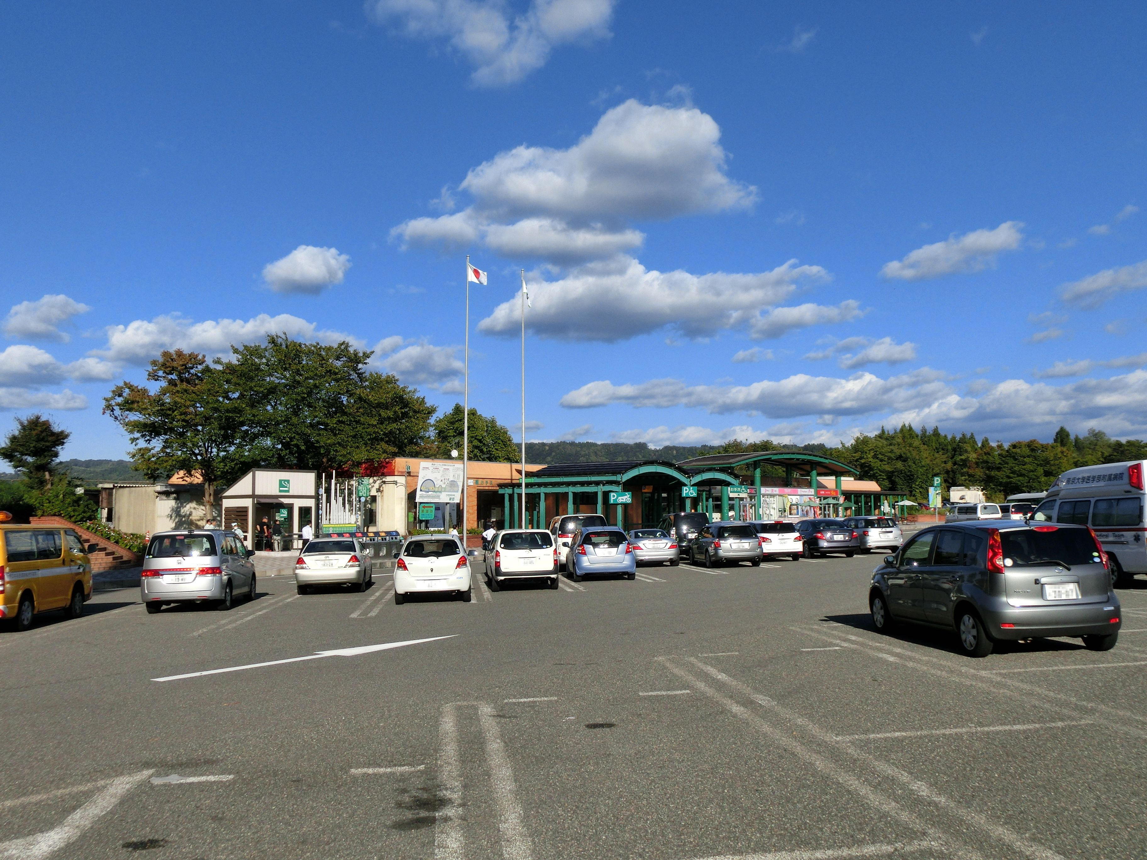 関越自動車道 越後川口サービスエリア（上り線）